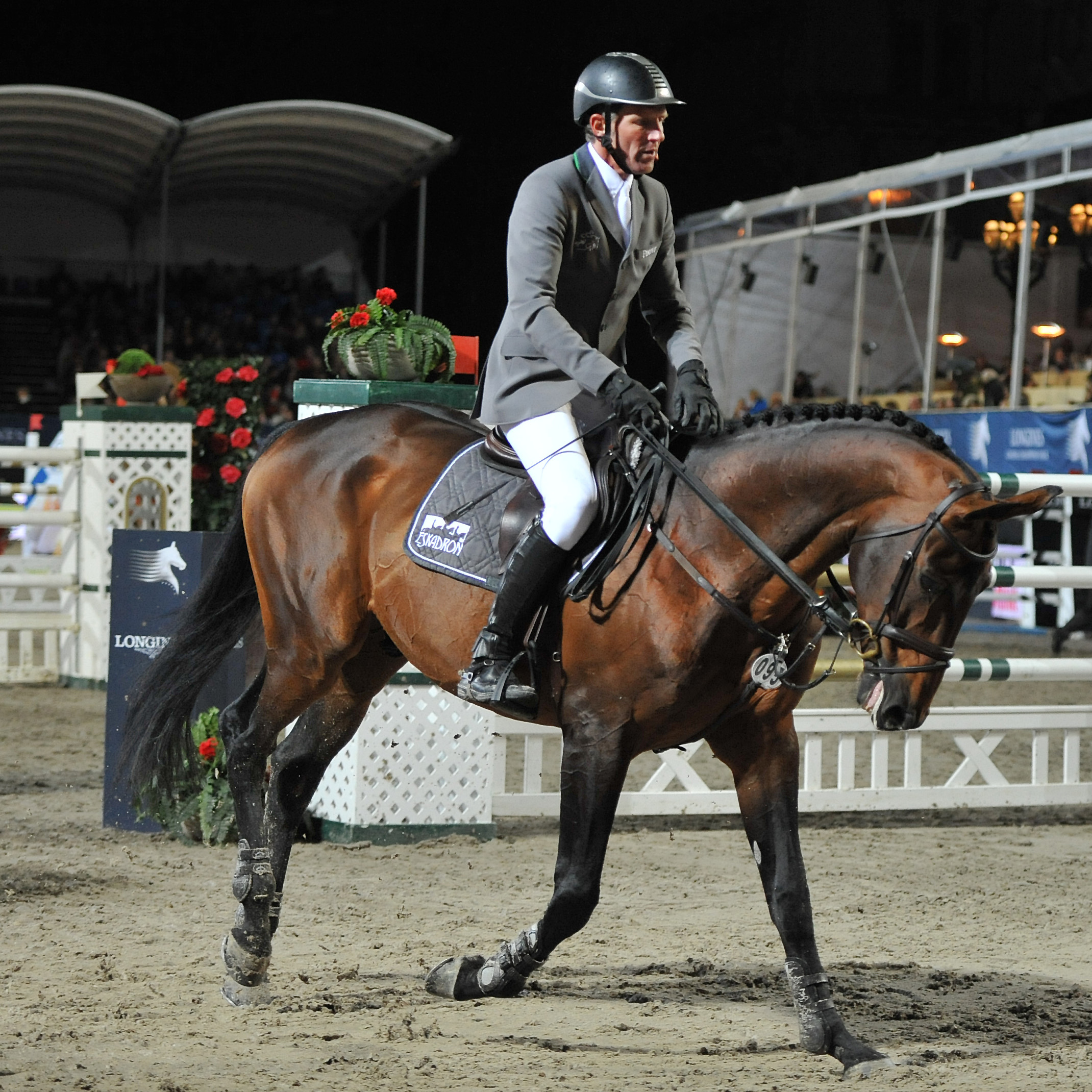 Vienna Masters am 21. September 2013 Longines Global Champions Tour Ludger Beerbaum (GER) auf Chaman